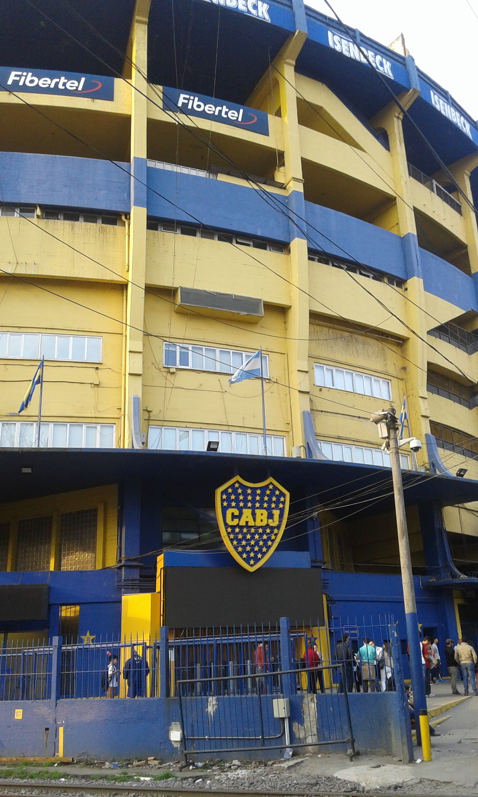 La Cancha de Boca El estadio de Boca se inauguró el 25 de mayo de 1940. El director del proyecto de la construcción fue el arquitecto argentino Víctor Sulcic, quien solía comparar la forma del estadio con una caja de bombones, originando así el sobre nombre de Bombonera. Esta cancha se encuentra en el barrio de La Boca, entre las calles Brandsen e Ibarlucea en la Ciudad Autónoma de Buenos Aires. En la actualidad la capacidad del estadio no alcanza para satisfacer la demanda de los hinchas de Boca Juniors. Es estadio es visitado diariamente por miles de turistas de todo el mundo.